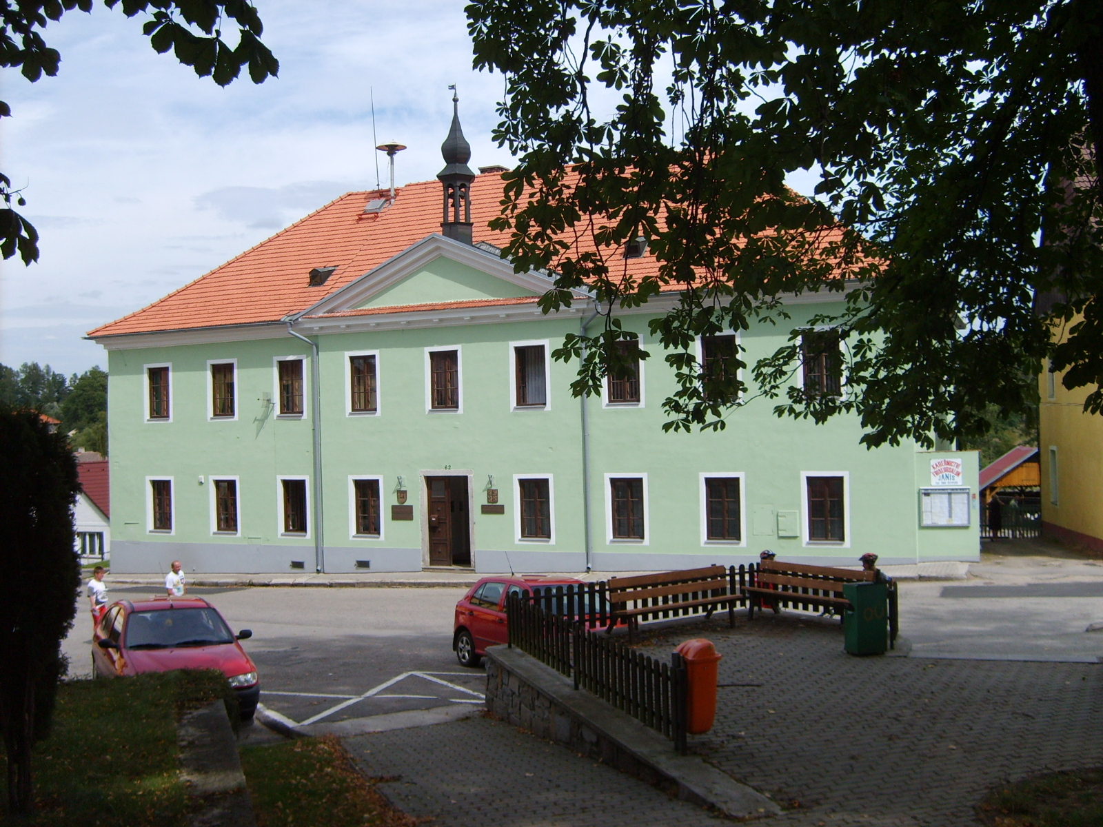 Townhall in Dolní Dvořiště.